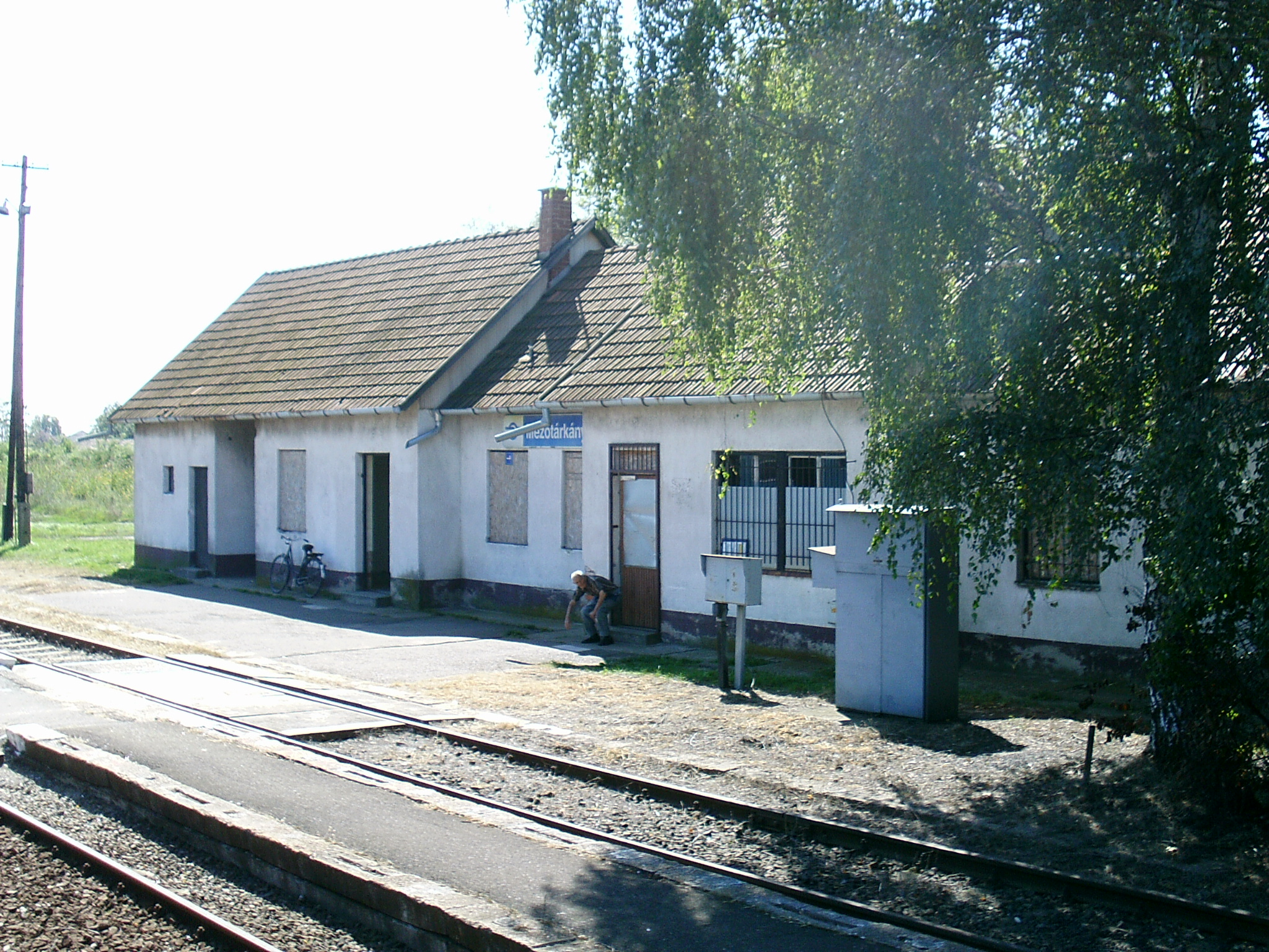 Mezőtárkány vasútállomás